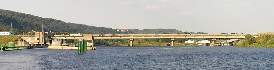 Stopień Wodny Kościuszko widziany z Wisły od strony Tyńca